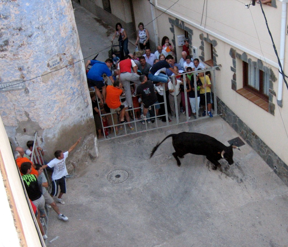 Correbou als carrers d'Alfara de Carles